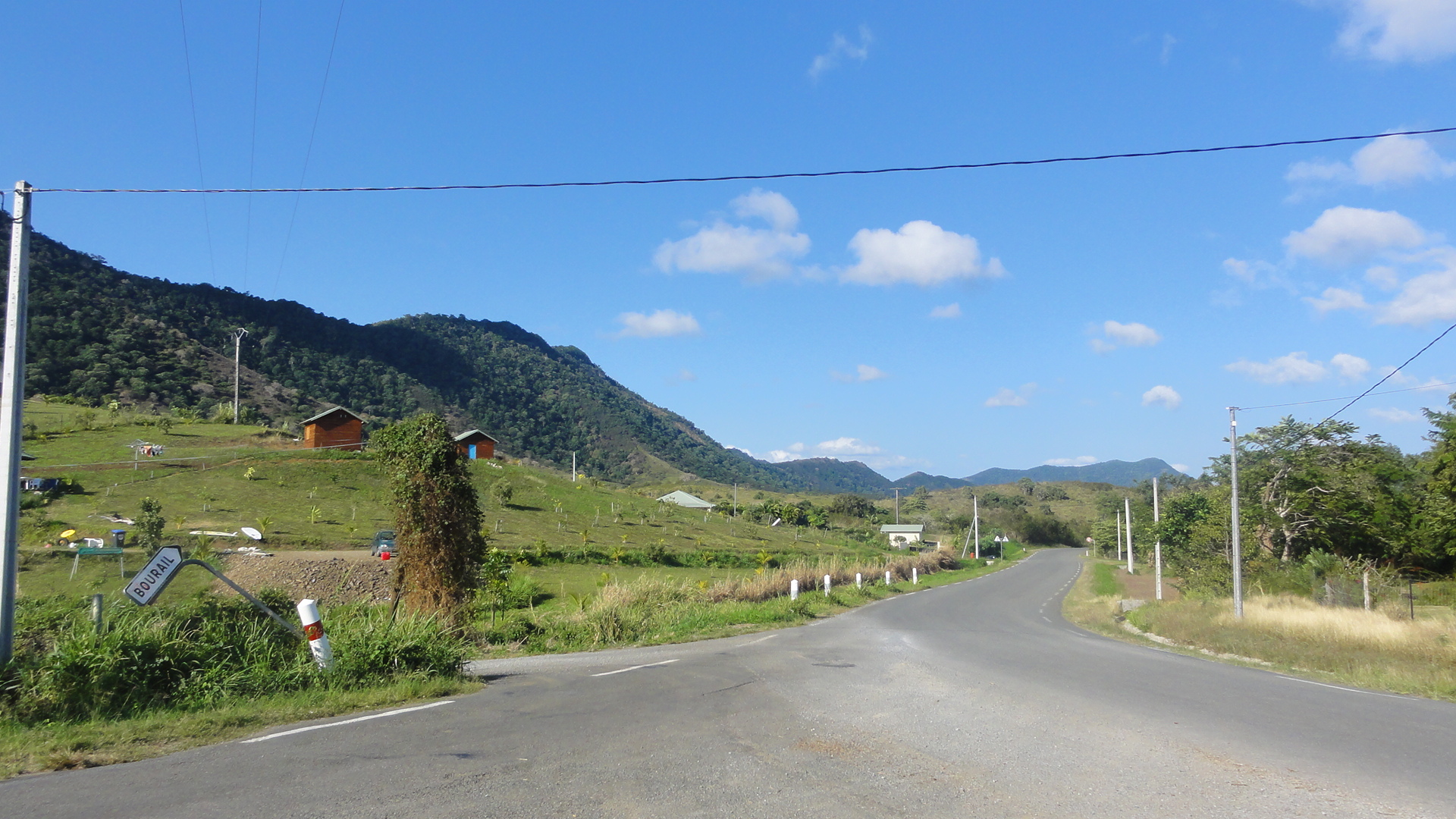 Quartier de Gouaro au bord de la Route Provinciale 20 (RP20)